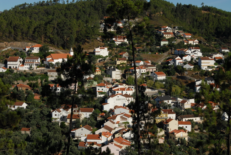 Village de Cambas, Portugal